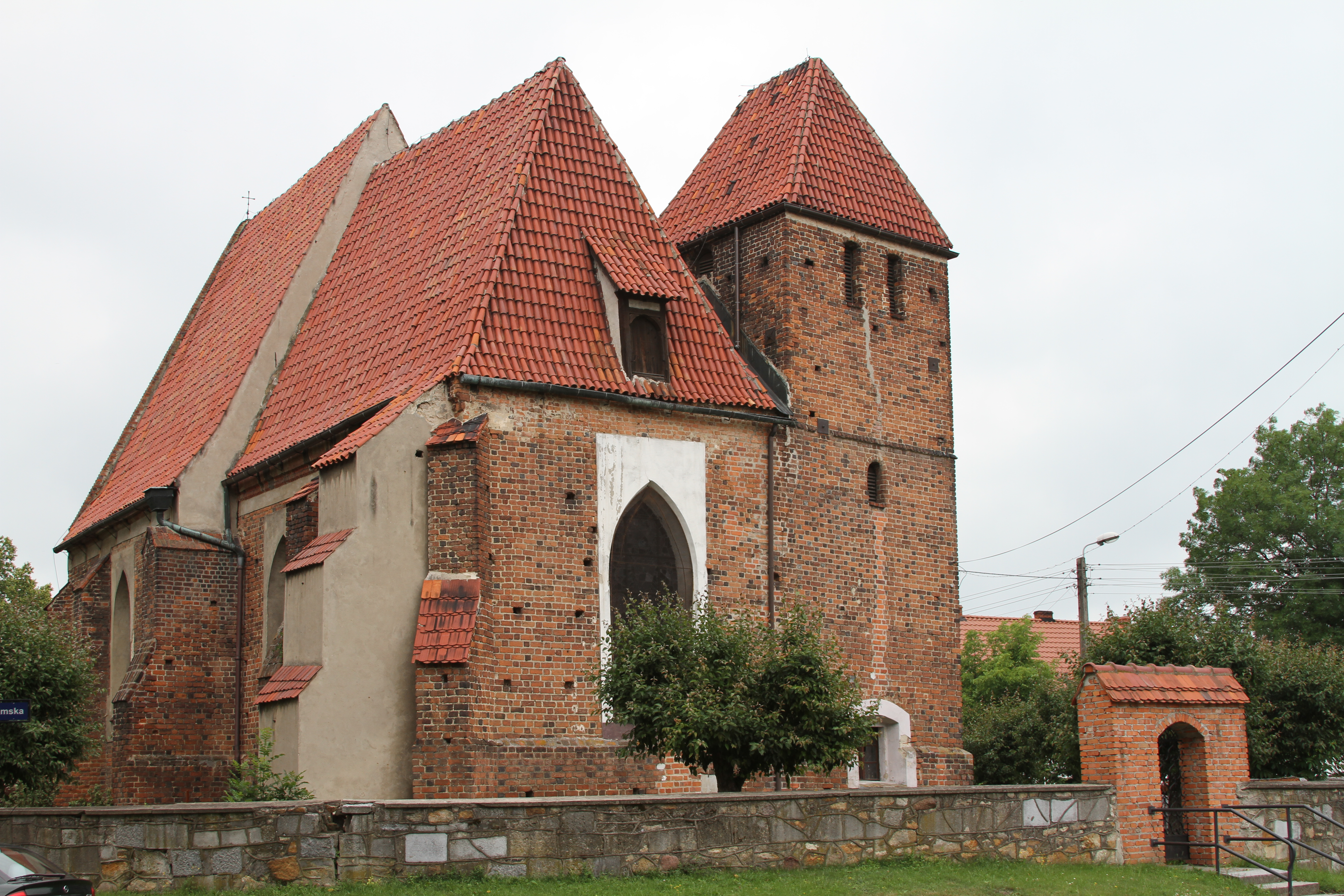 Kirche in Tinz, Kreis Beslau (poln.: Tyniec Mały)